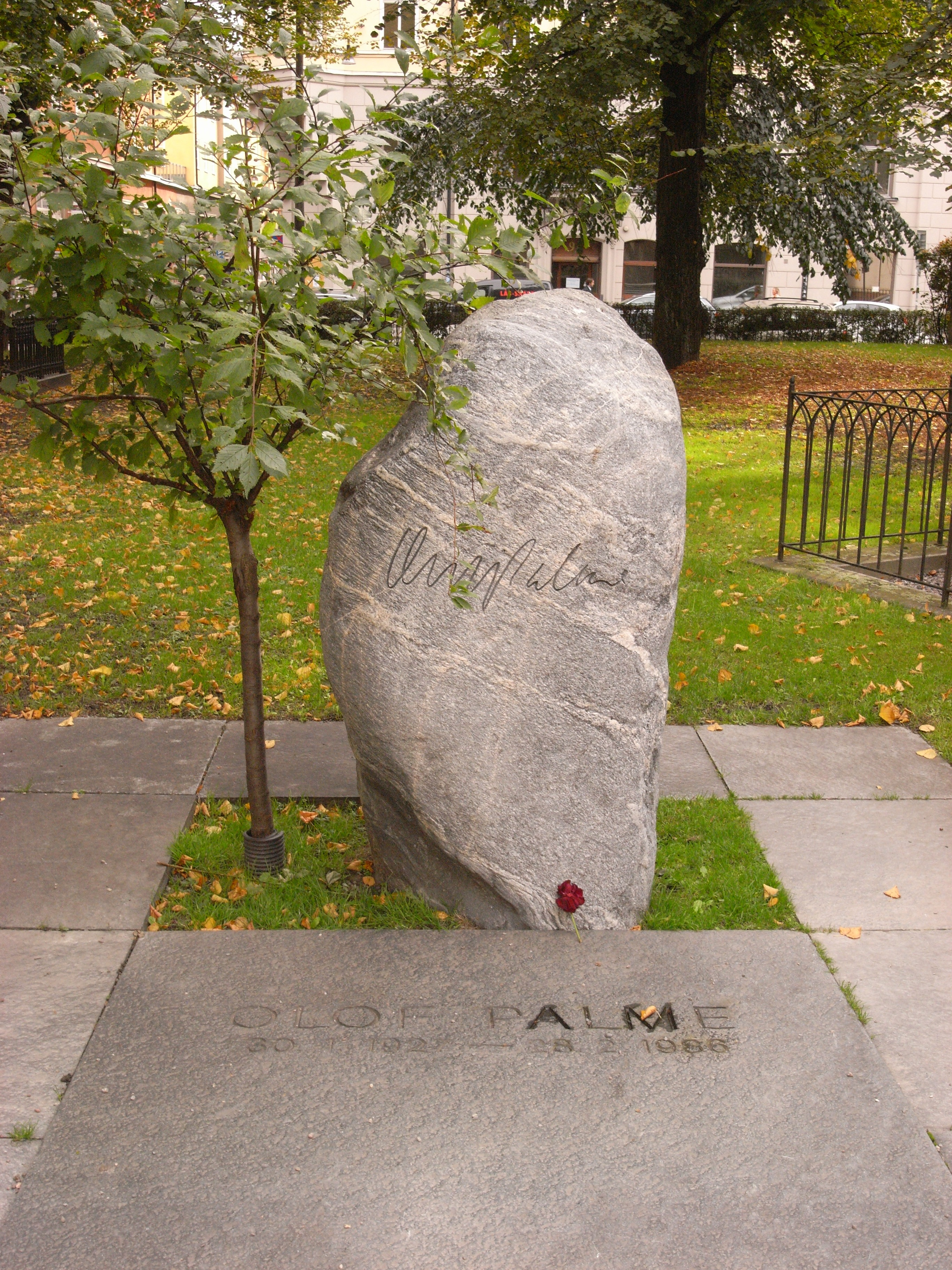 Adolf Fredriks kyrka (Norrmalm 1:33)